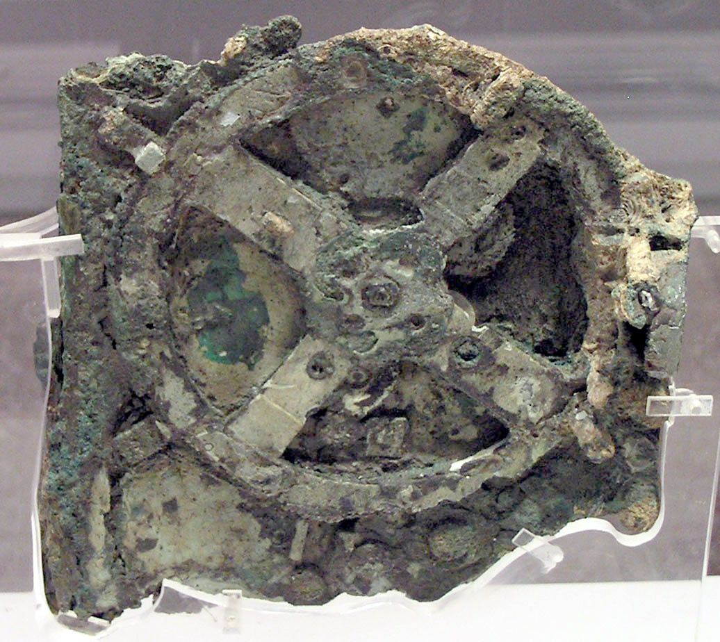 Antikythera_Mechanissem